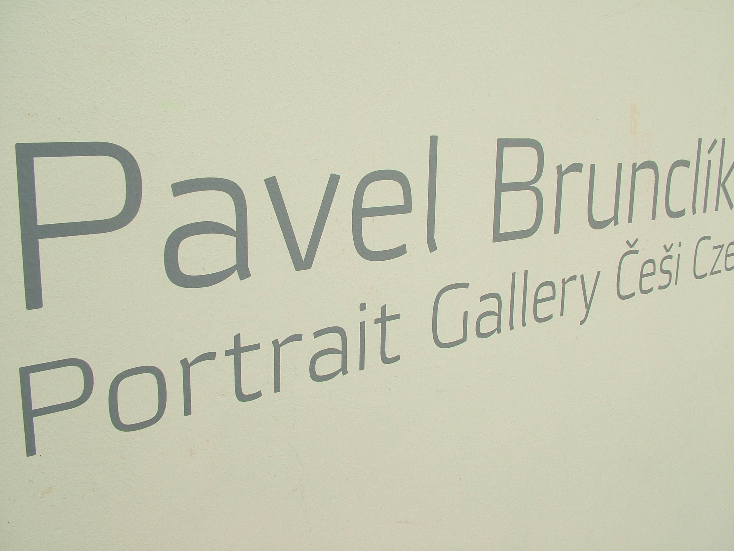 Výstava portrétních fotografií Češi, Kampa Museum, Praha, 2011